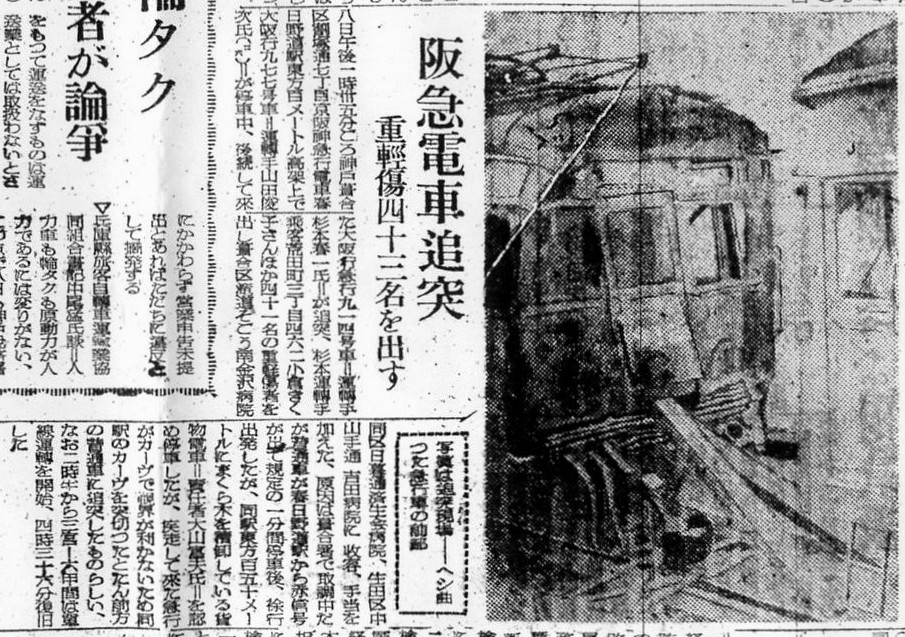 1948年9月8日に発生した京阪神急行電鉄(阪急)春日野道駅での追突事故を伝える神戸新聞の記事。